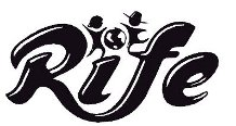 Logo de l'association RIFE